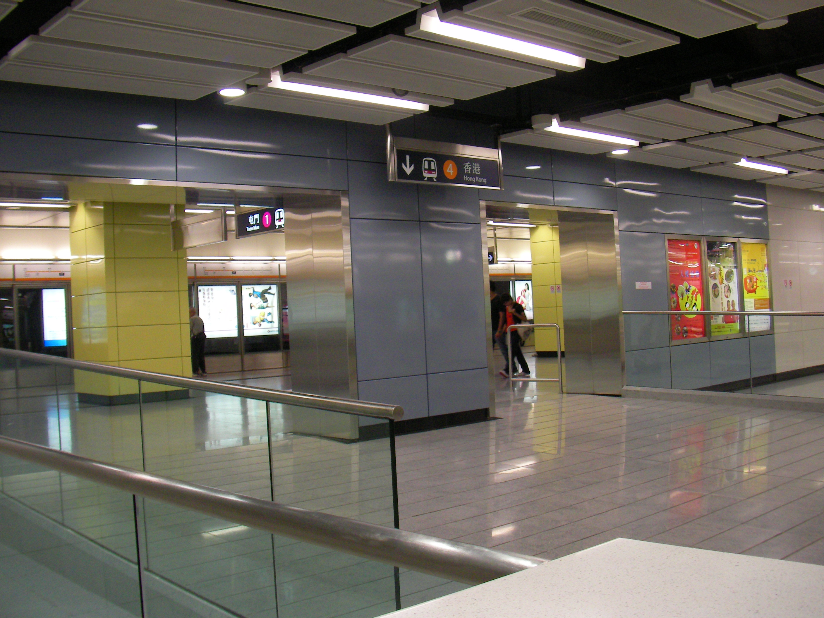 中文（香港）: 南昌站的新轉綫通道